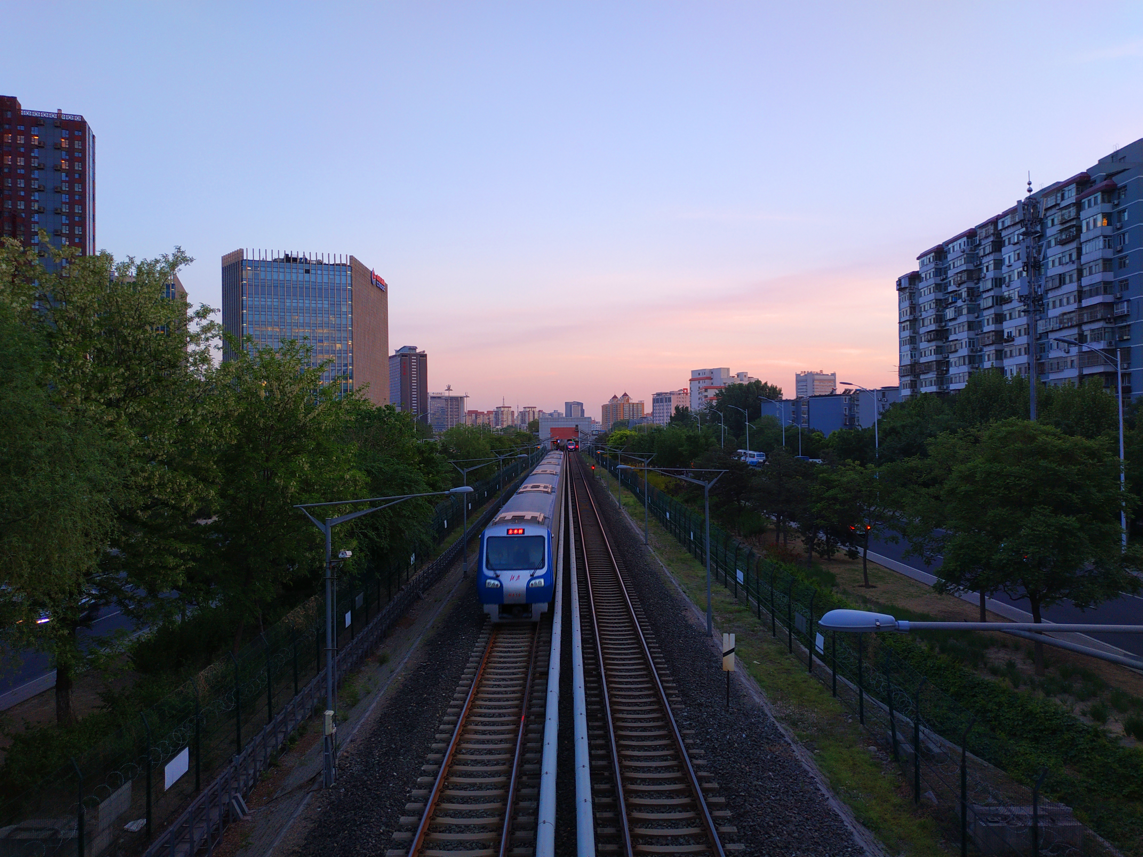 北京地铁13号线，摄于芍药居站附近，两侧是京承高速公路